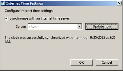 Монгол: zurag